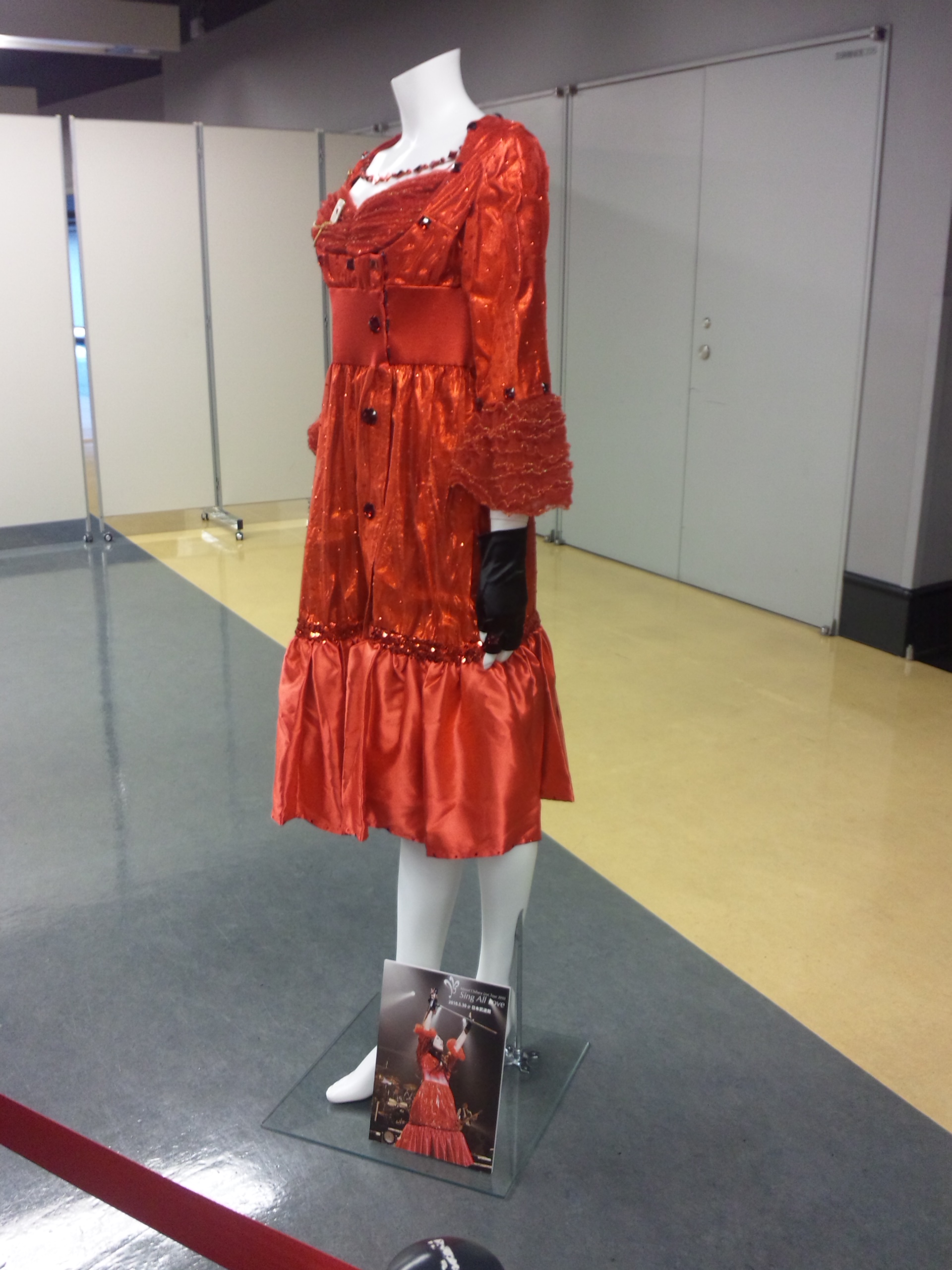 アニメロミックス Presents Minori Chihara Birthday Live 2012 supported by JOYSOUND 衣装展覧会より 『Minori Chihara Live Tour 2010 〜Sing All Love〜』の衣装。